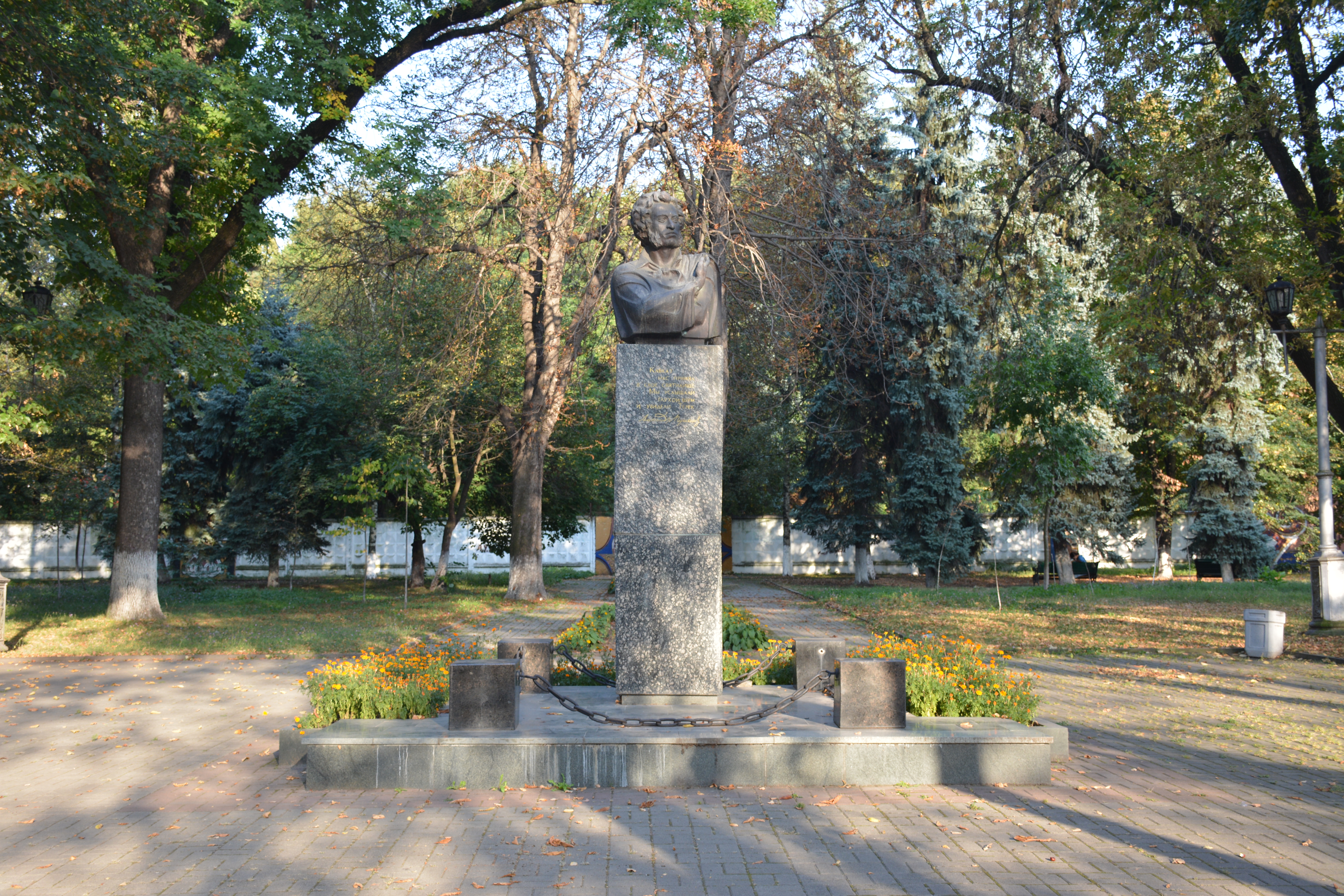 Сквер им. А. С. Пушкина: улица Димитрова / улица Церетели., Владикавказ, Северная Осетия